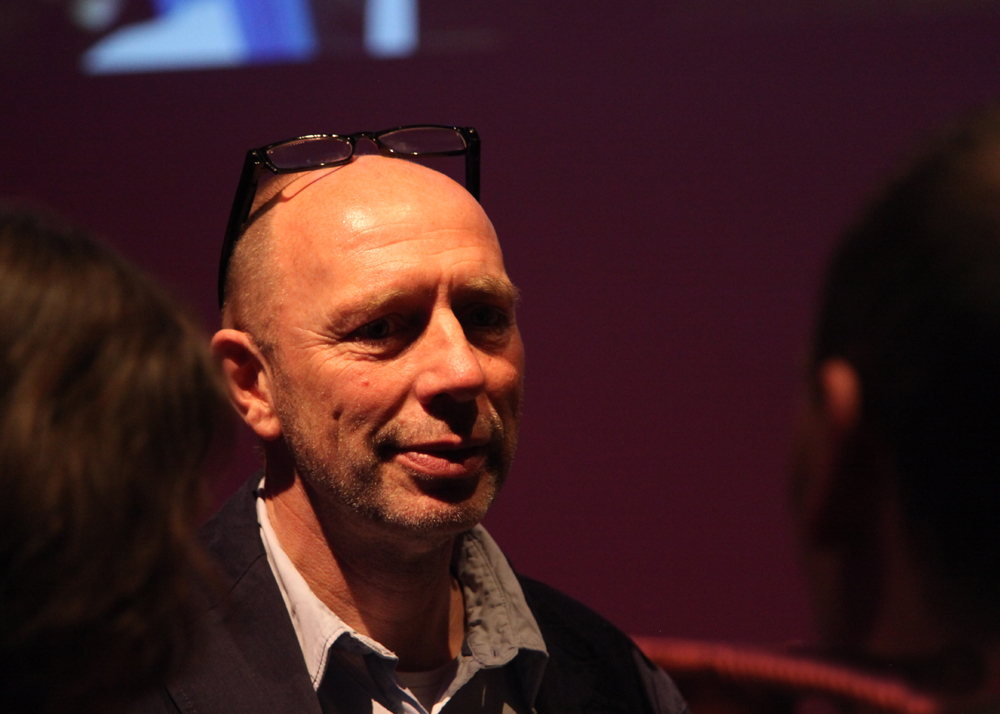 In LUX te Nijmegen werd in de serie Wielerklassiekers de derde aflevering gehouden over de Amstel Gold Race, met onder andere oud-renner Jelle Nijdam.